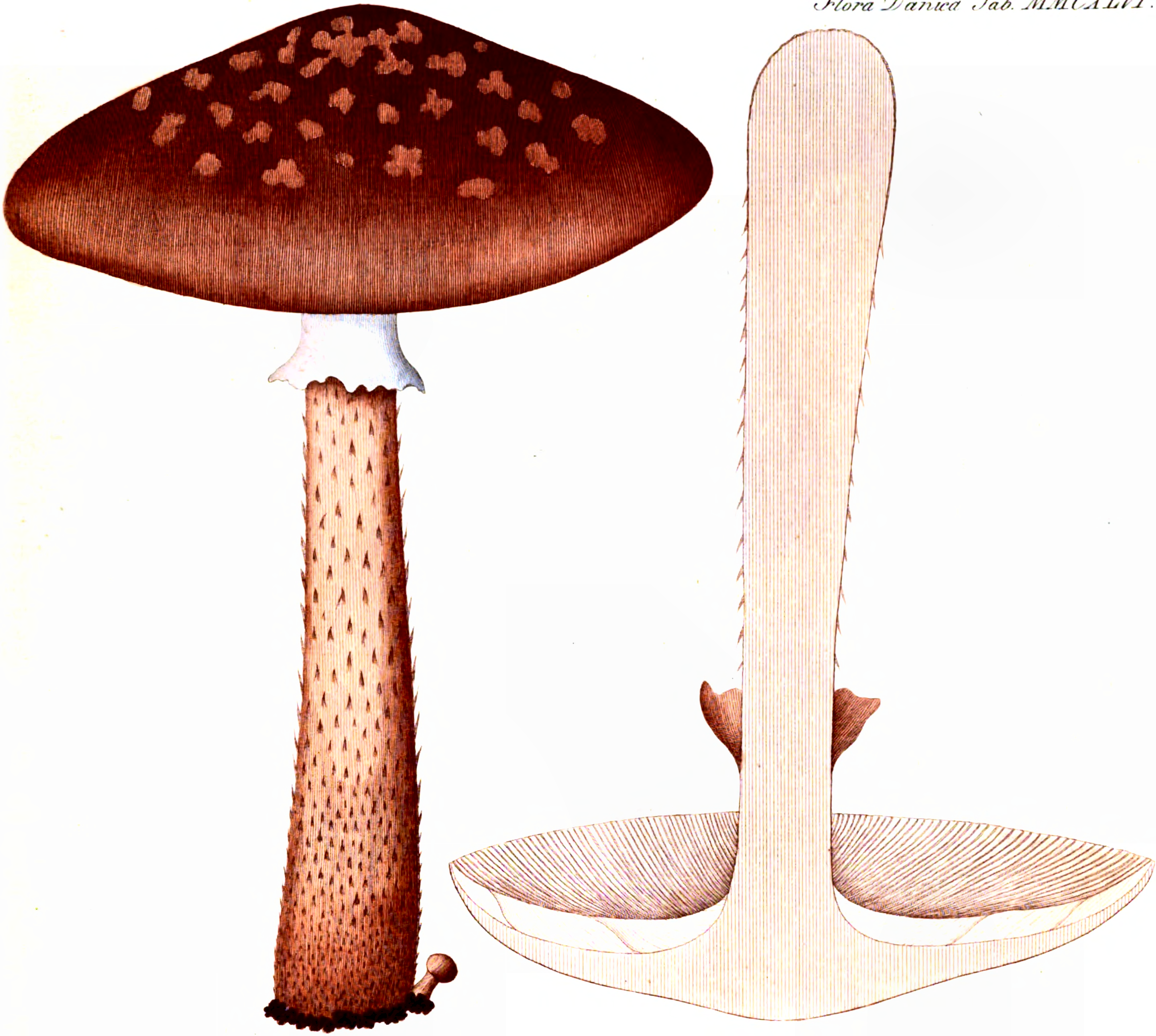 Agaricus magnificus (Fr.) = Amanita rubescens (Gray)